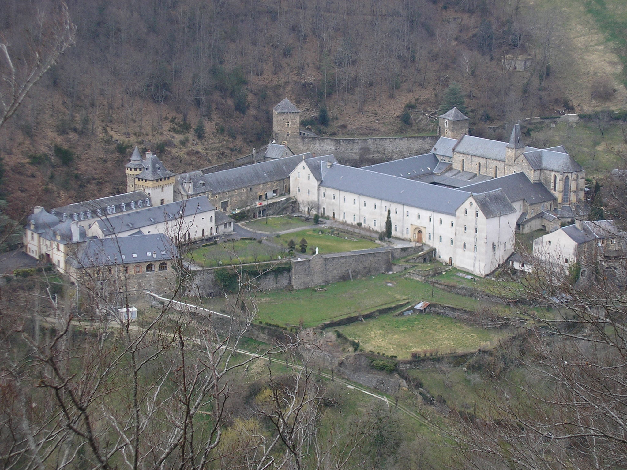 Vue d'ensemble de l'abbaye de Bonneval (Aveyron)